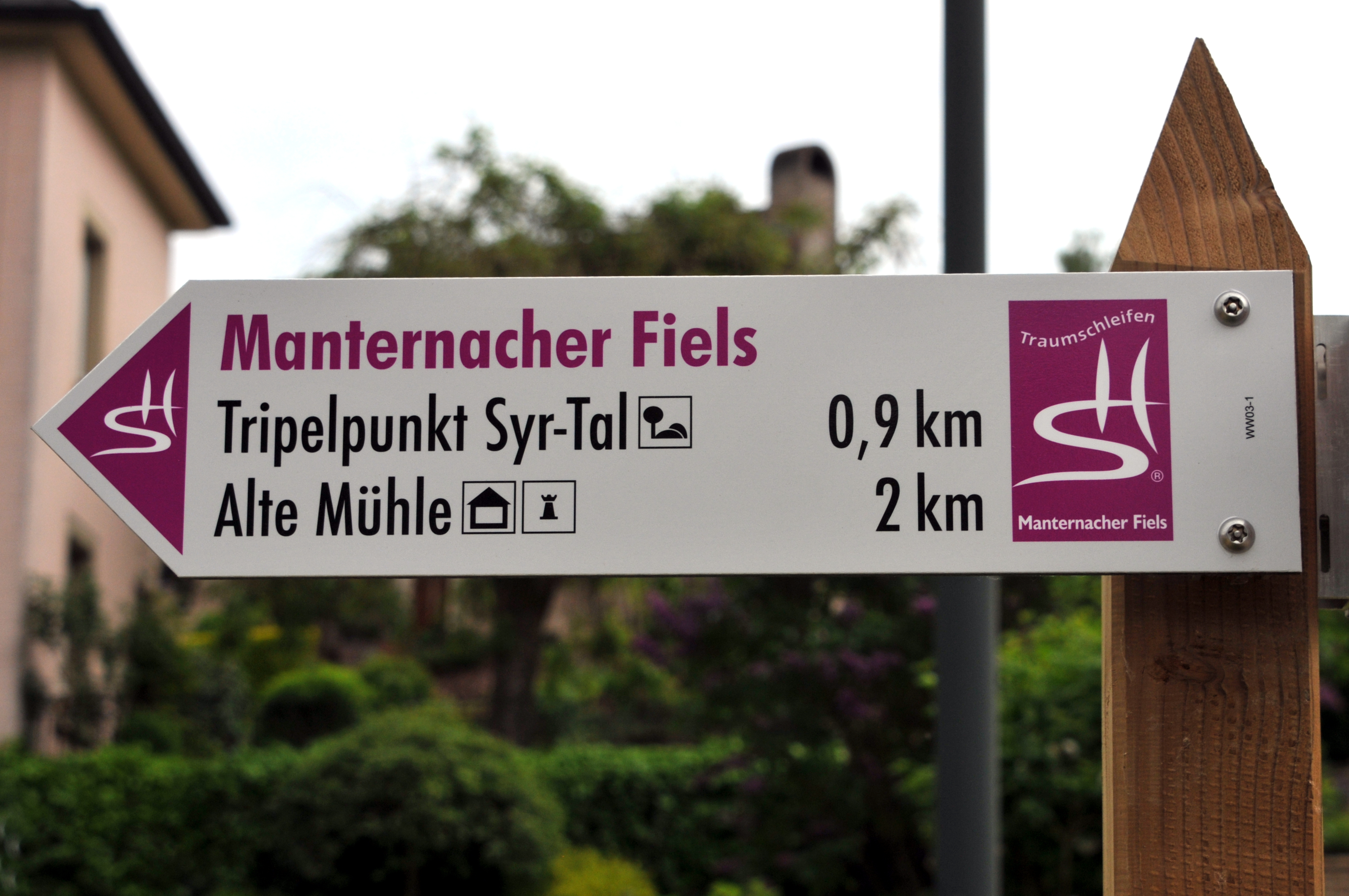 Um Trëppelwee Manternacher Fiels zu Manternach.